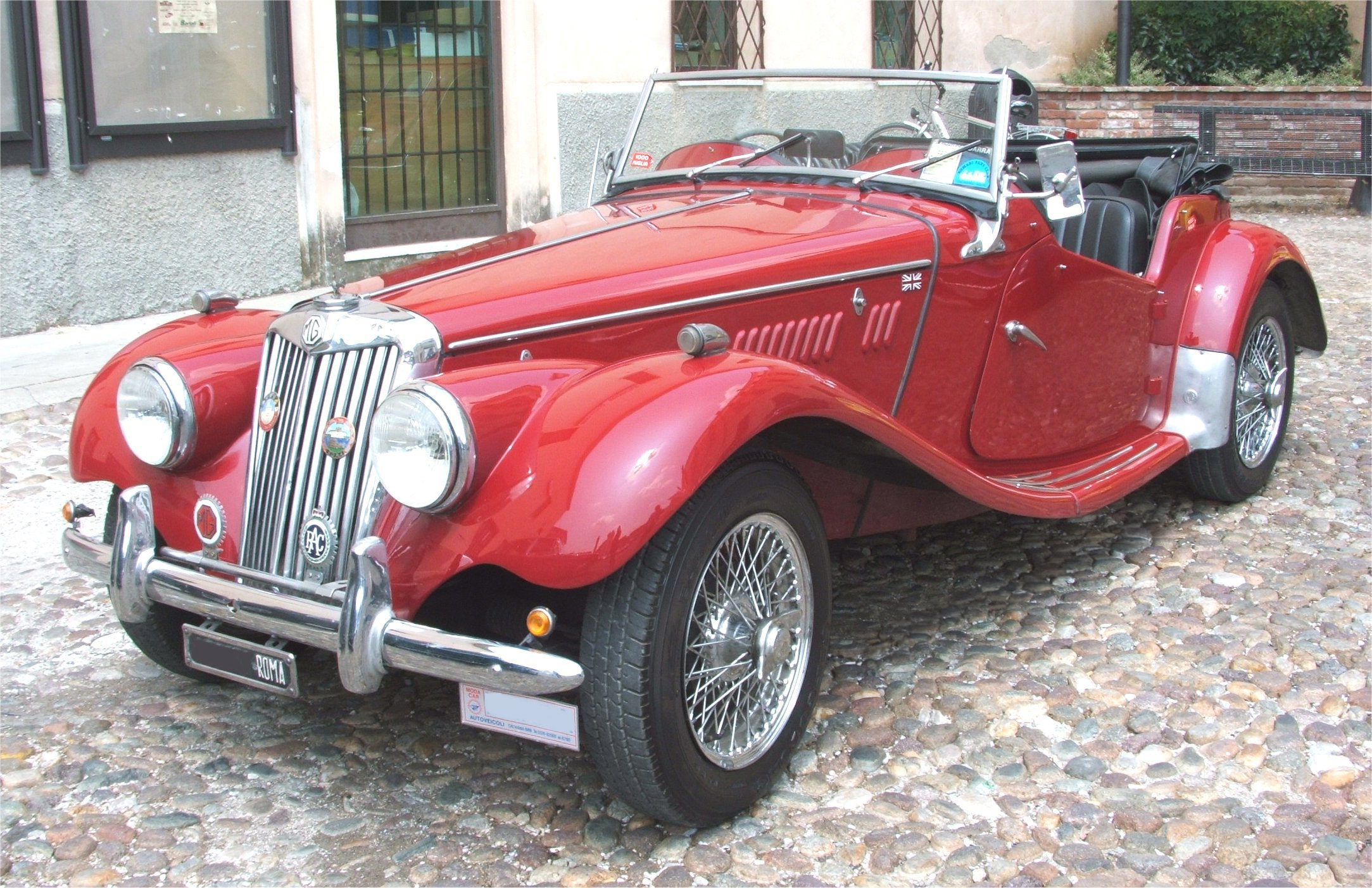 MG modello TF del 1954 fotografato al Raduno Auto Storiche di Medole nel 2007